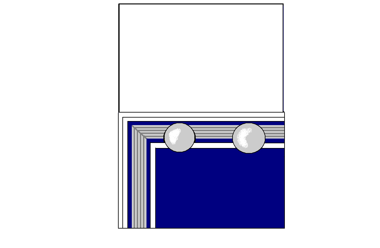 Schwedische Aufschläge preuß. Kürassiere (Unteroffiziere)